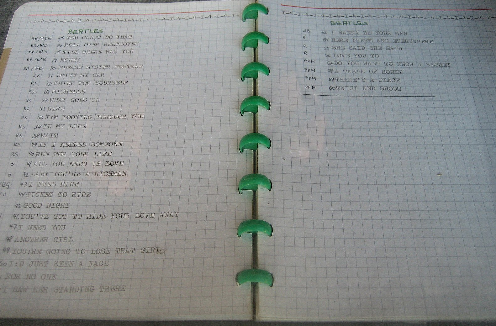 Dem Jhemp Hoscheit säin Heft, an dat en 1968 d'Beatles-Alben agedroen huet. Ausgestallt an der Fënster vun enger Escher Librairie, bei der Presentatioun vu sengem Roman Aacht Deeg an der Woch, am Juli 2006.